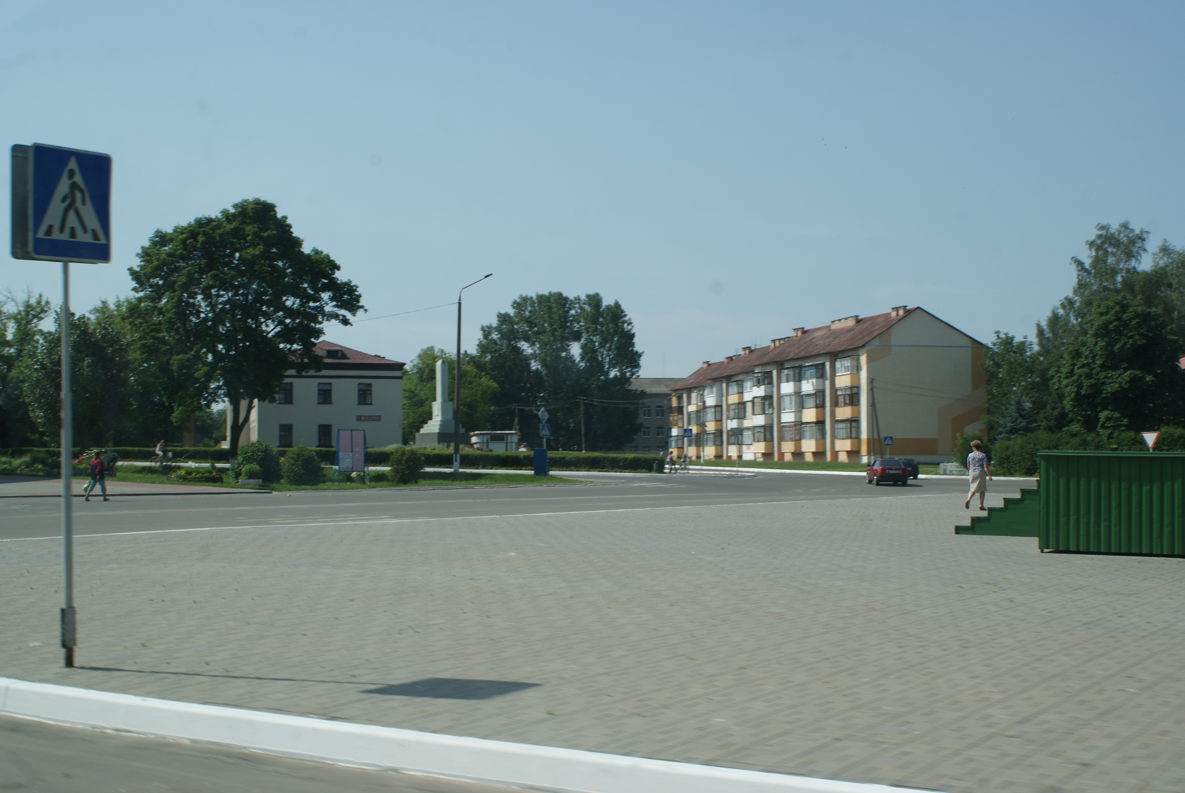 be:Гарадскі пасёлак Чырвоная Слабада